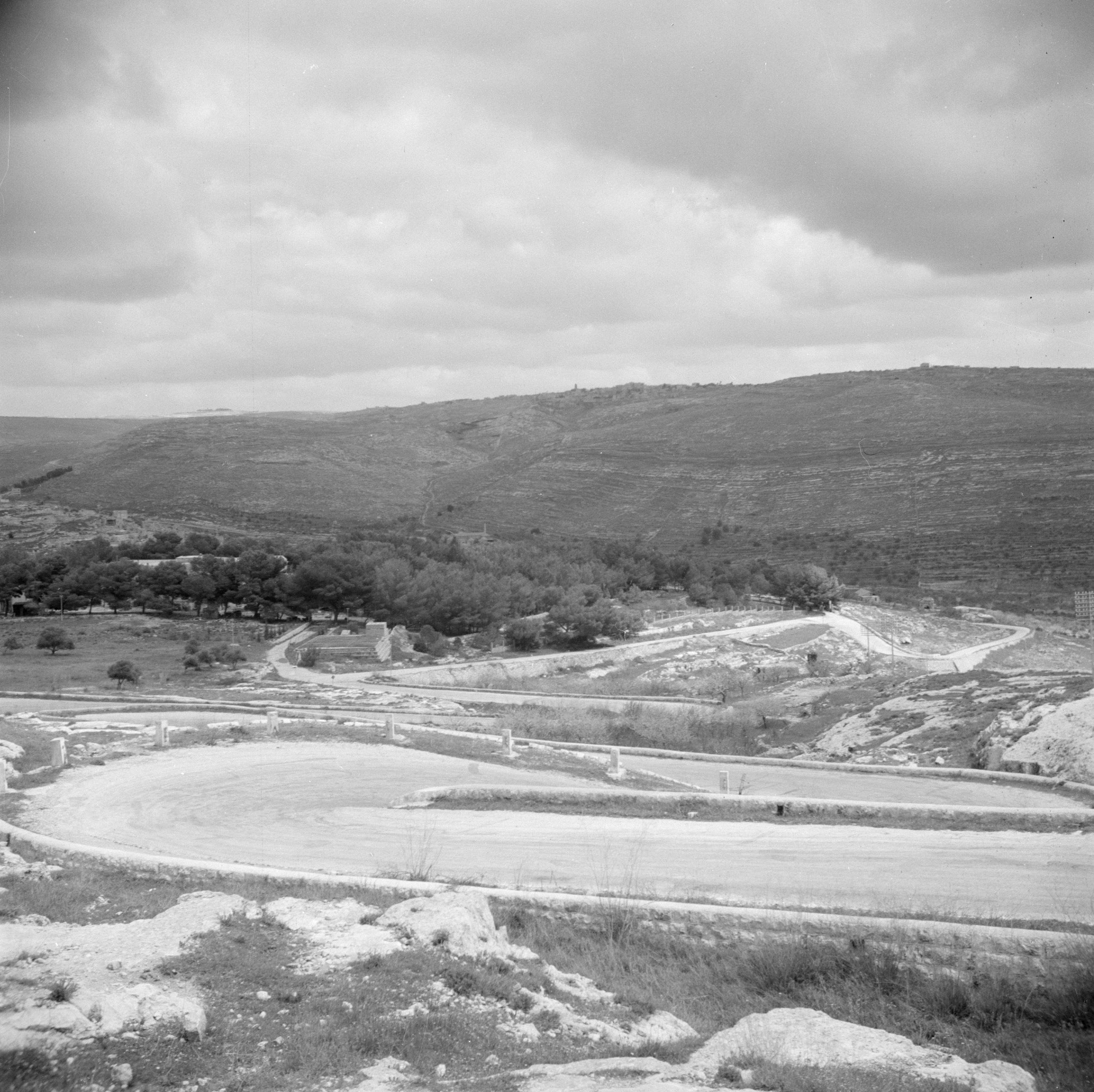 Collectie / Archief : Fotocollectie Van de Poll Reportage / Serie : Israël 1948-1949: onderweg naar Jeruzalem Beschrijving : De 7 zusters, de zeven bochten in de weg van Tel Aviv naar Jeruzalem (laatstgenoemde stad zichtbaar aan de horizon op de heuvels) Datum : 1948 Locatie : Israël, Jeruzalem Trefwoorden : bergen, panorama's, wegen Fotograaf : Poll, Willem van de, [onbekend] Auteursrechthebbende : Nationaal Archief Materiaalsoort : Negatief (zwart/wit) Nummer archiefinventaris : bekijk toegang 2.24.14.02 Bestanddeelnummer : 255-0870